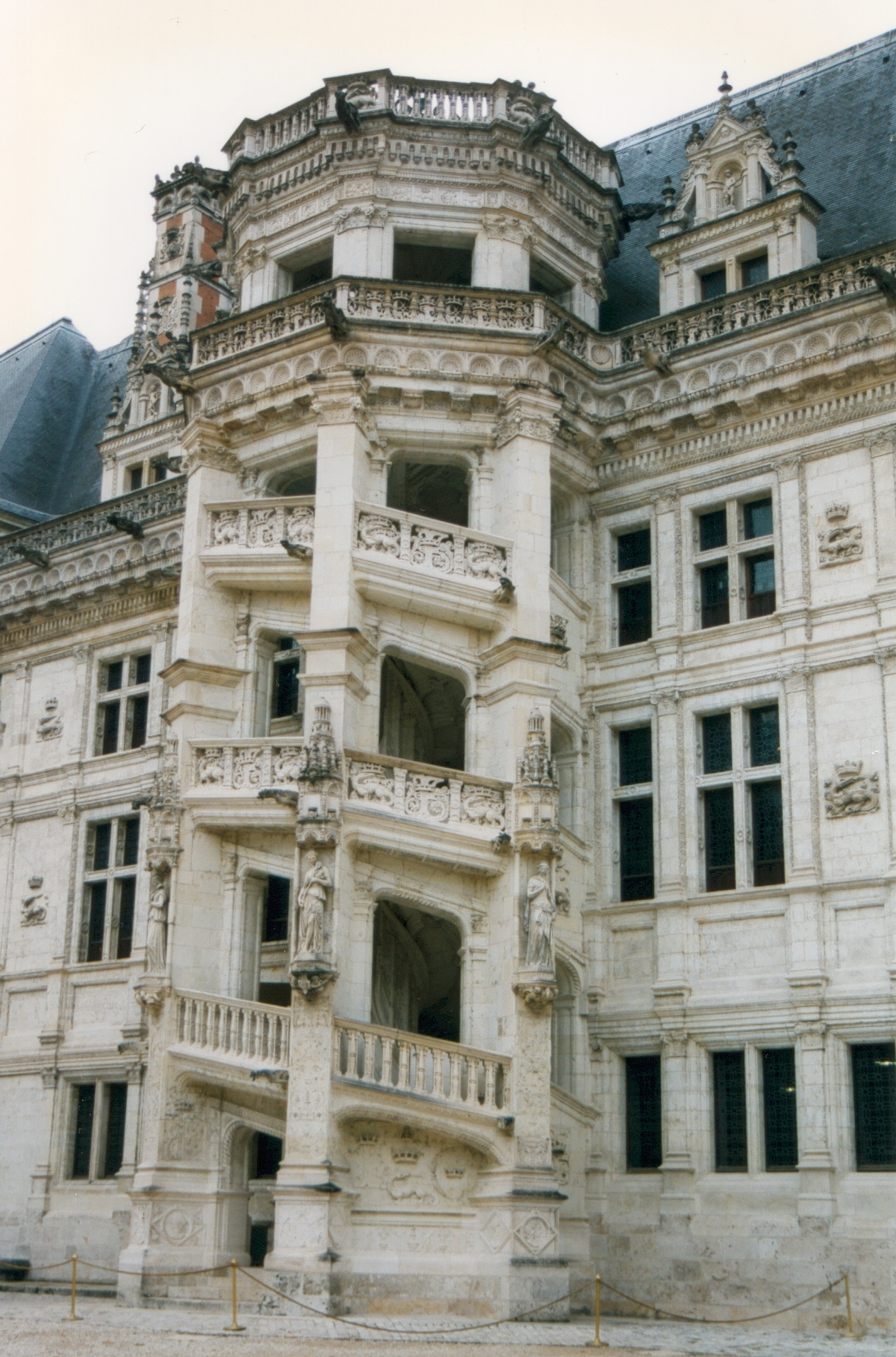 France Loir-et-Cher Blois Château Photographie prise par GIRAUD Patrick